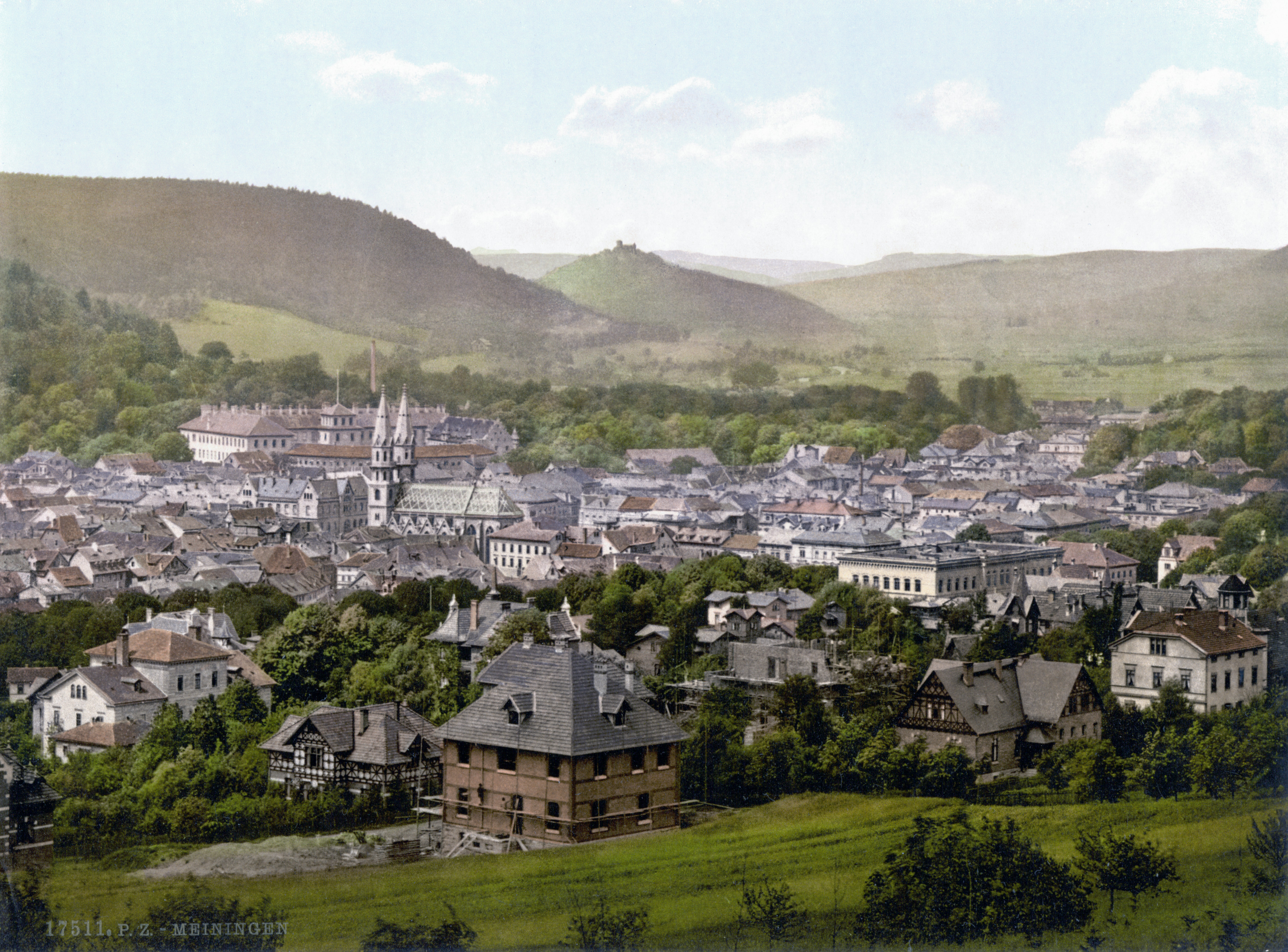 Meiningen